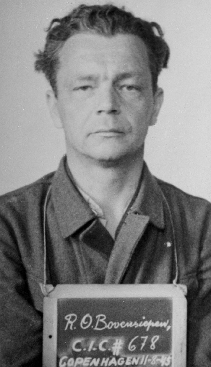 Otto Bovensiepen (1905-1979), deutscher Jurist, Gestapobeamter und SS-Standartenführer, zuletzt Befehlshaber der Sicherheitspolizei und des Sicherheitsdienstes in Dänemark.